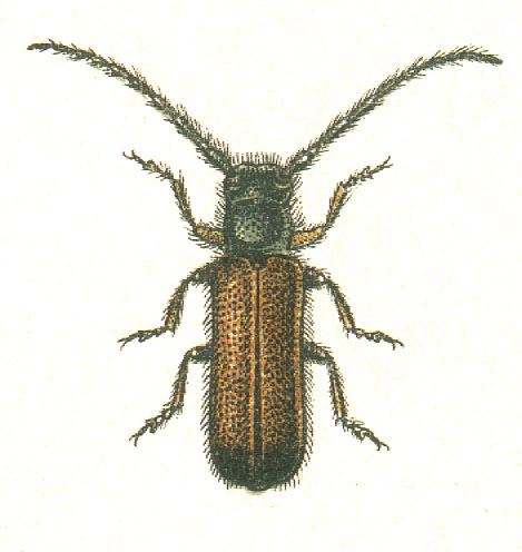 Tetrops praeusta